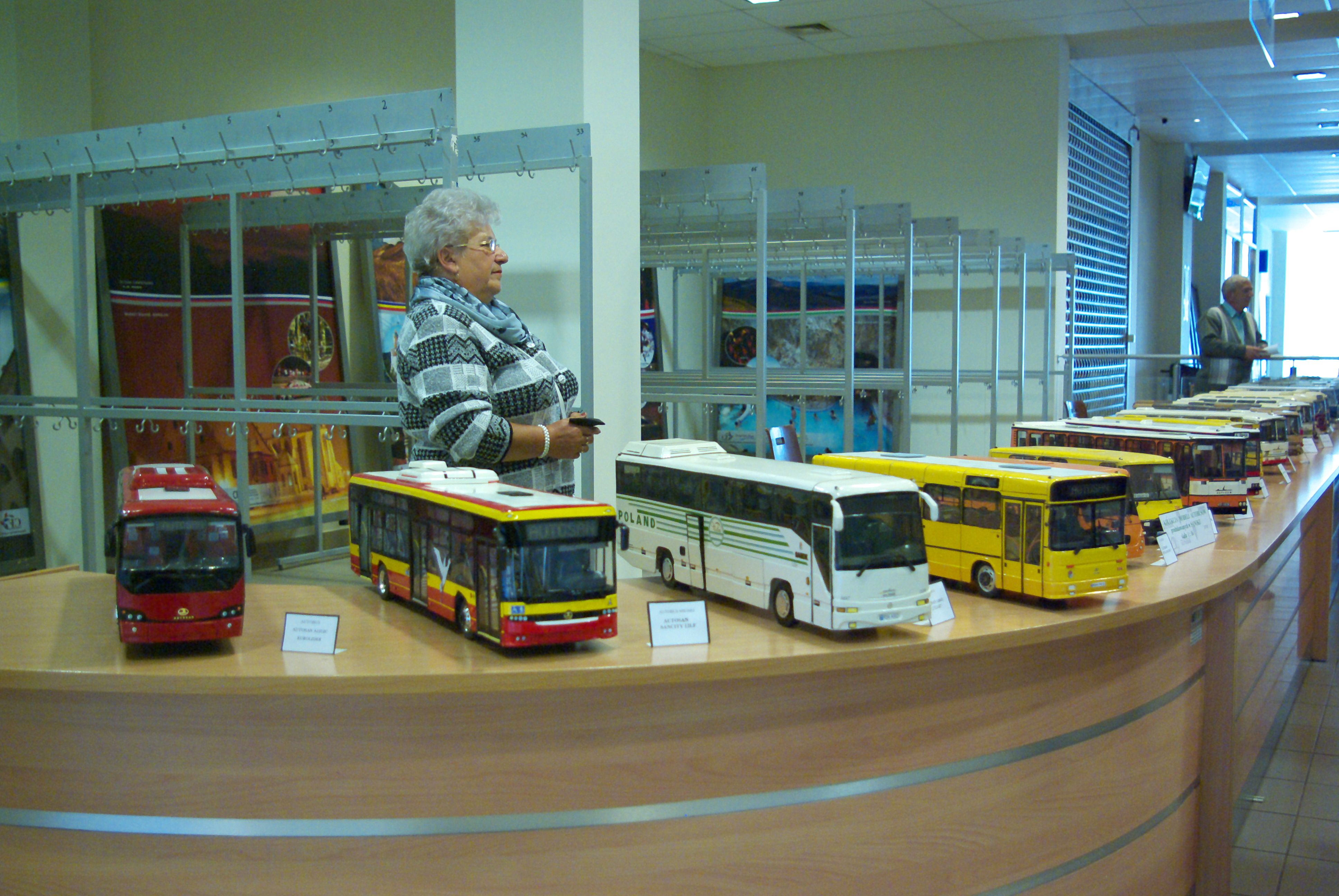 Wystawa Autosanu w hali Arena Sanok (czerwiec 2014)